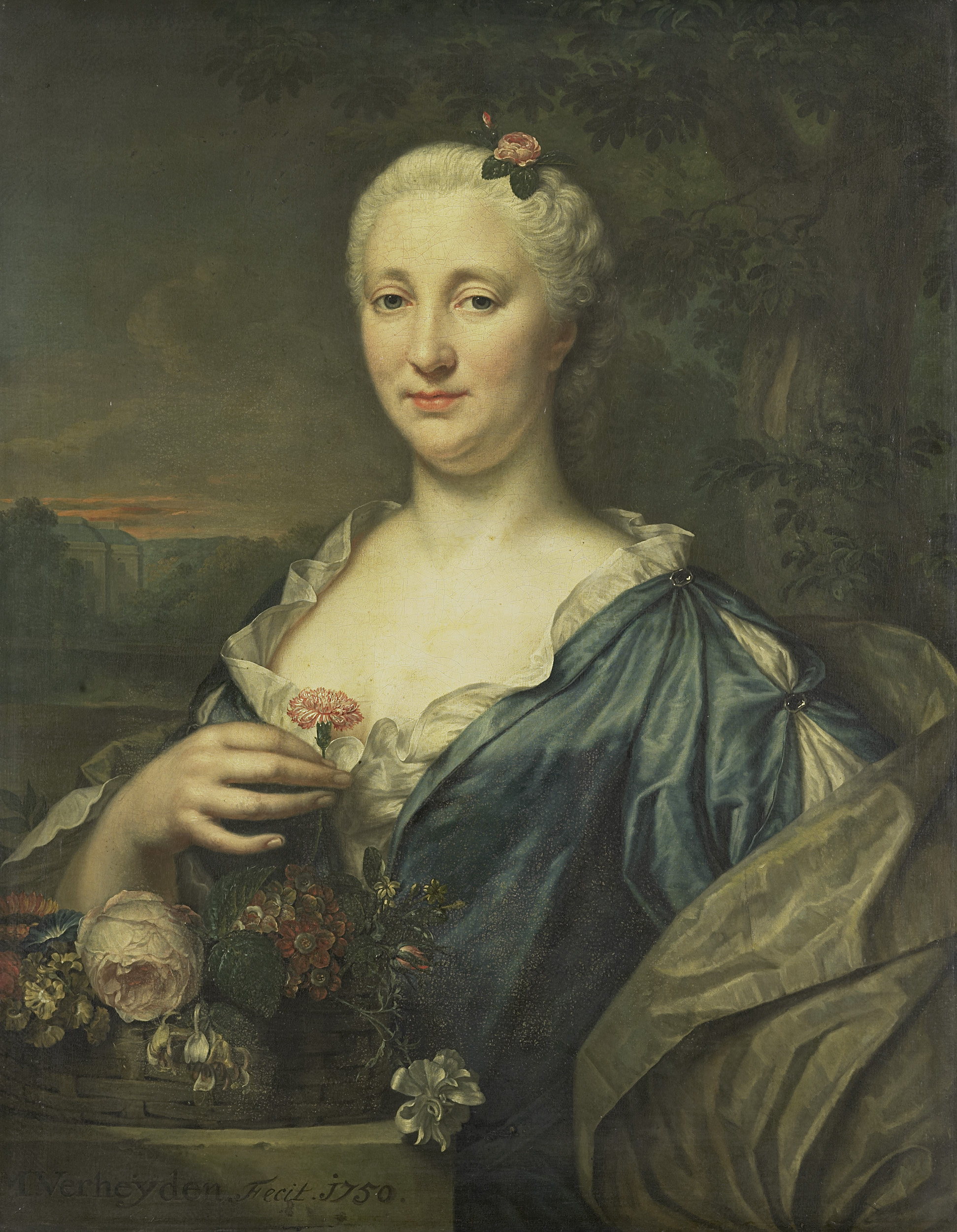 Portret van Agnes Margaretha Albinus (1713-73), echtgenote van Coenraad van Heemskerck. Ten halven lijve, bij een mand met een bloemstuk, een anjer in de rechterhand voor de borst. Pendant van SK-A-1438.